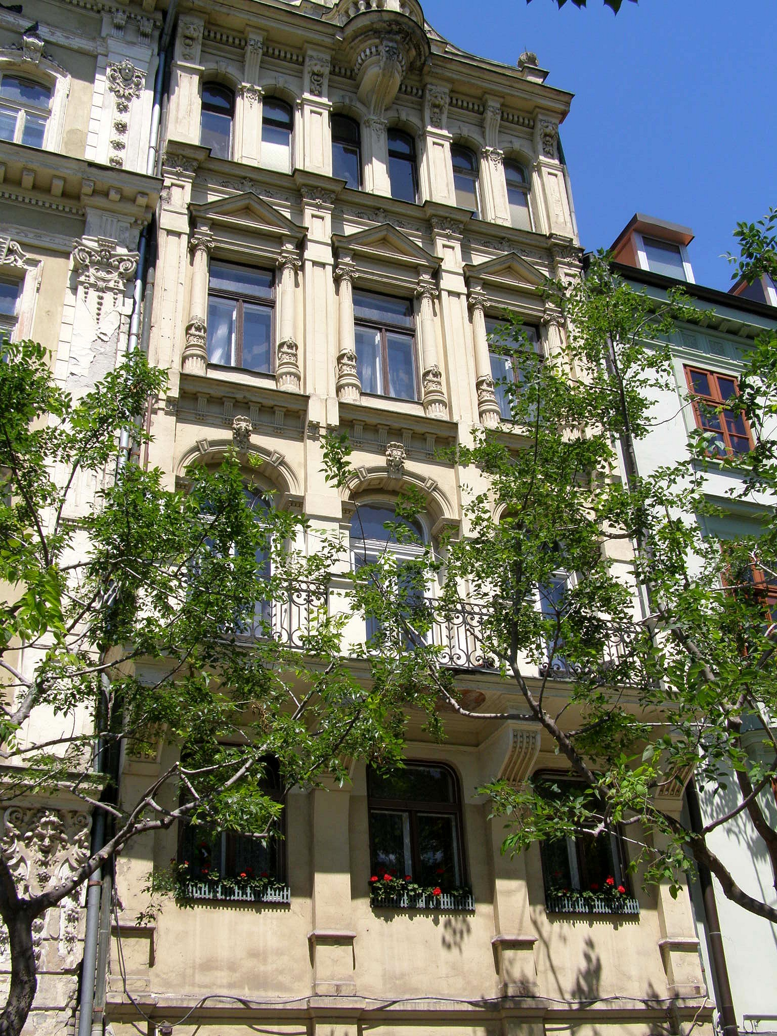 Hviezdoslavovo nám. č. 12